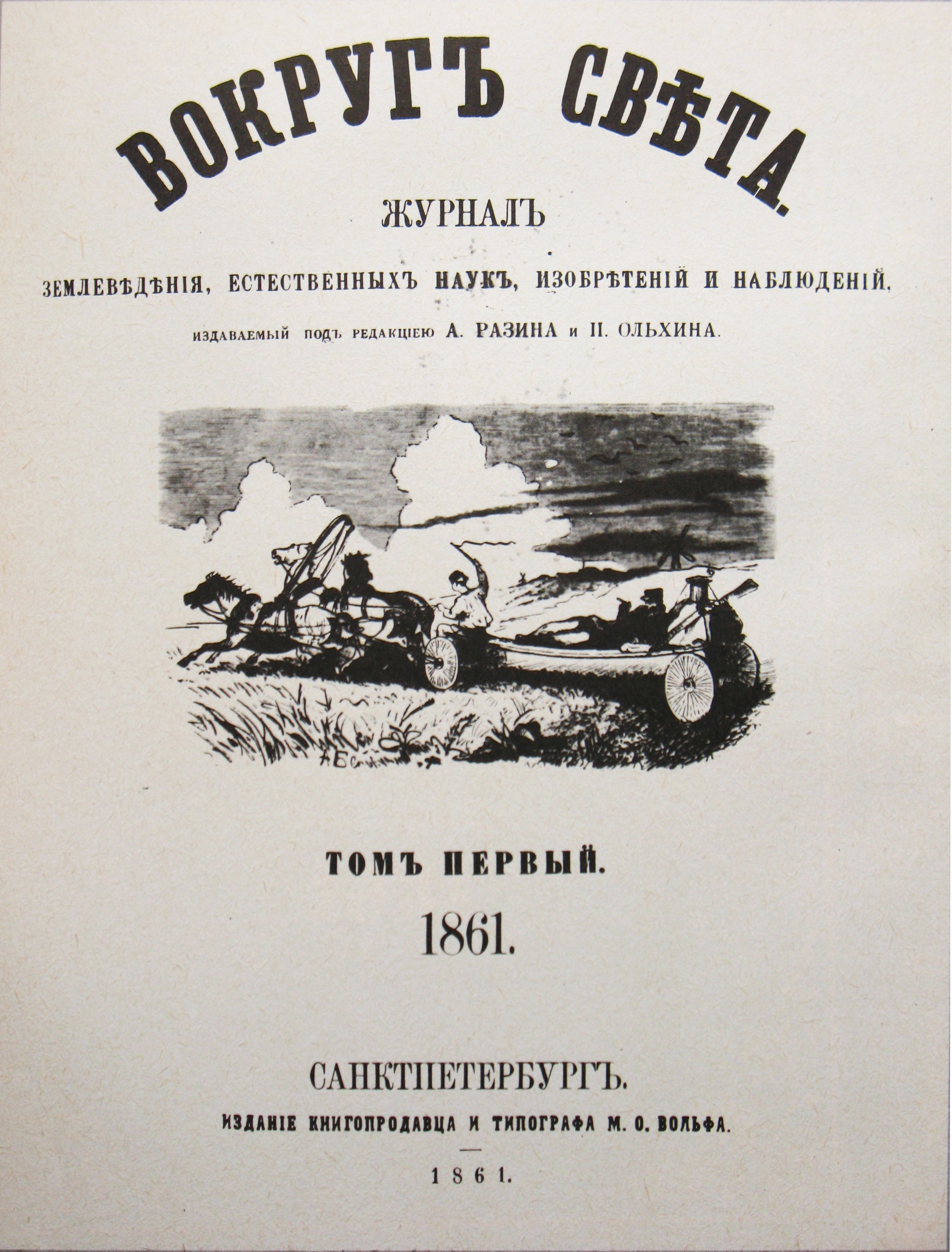 Вокруг света. Журнал землеведения, естественных наук, изобретений и наблюдений. Издание книгопродавца и типографа М.О. Вольфа 1861. Титульный лист 1 тома.